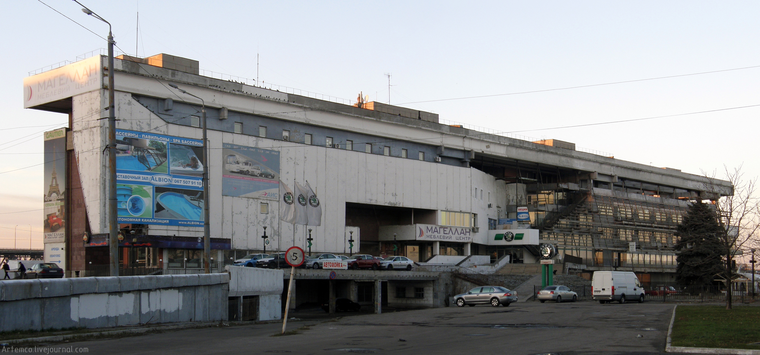 днепропетровский речной вокзал